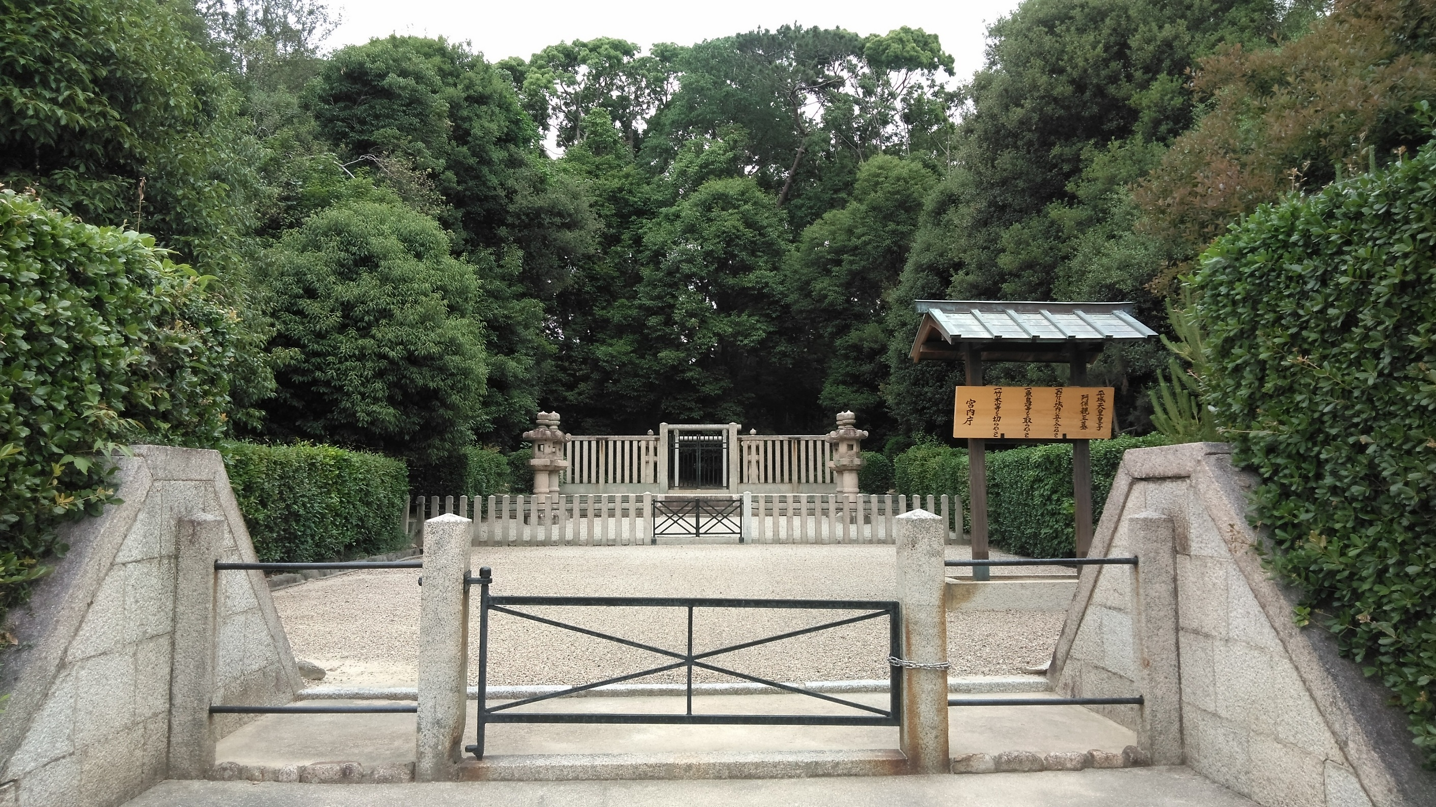 阿保親王塚古墳(阿保親王墓) 拝所